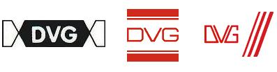 Logos der DVG aus 5 Jahrzehnten